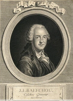 Jean-Joseph Balechou (1715-1764)